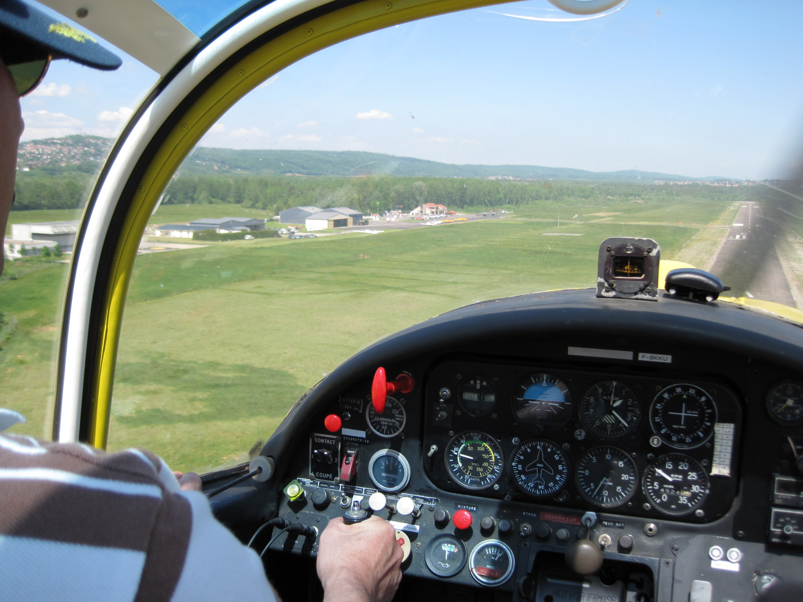 Aérodrome de Besançon-La Vèze